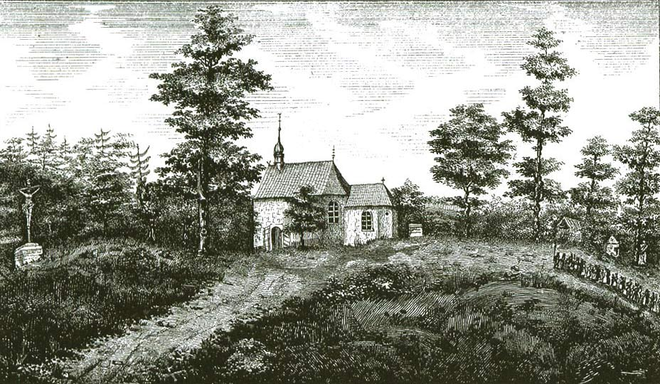 Die Annabergkapelle bei Haltern-am-See